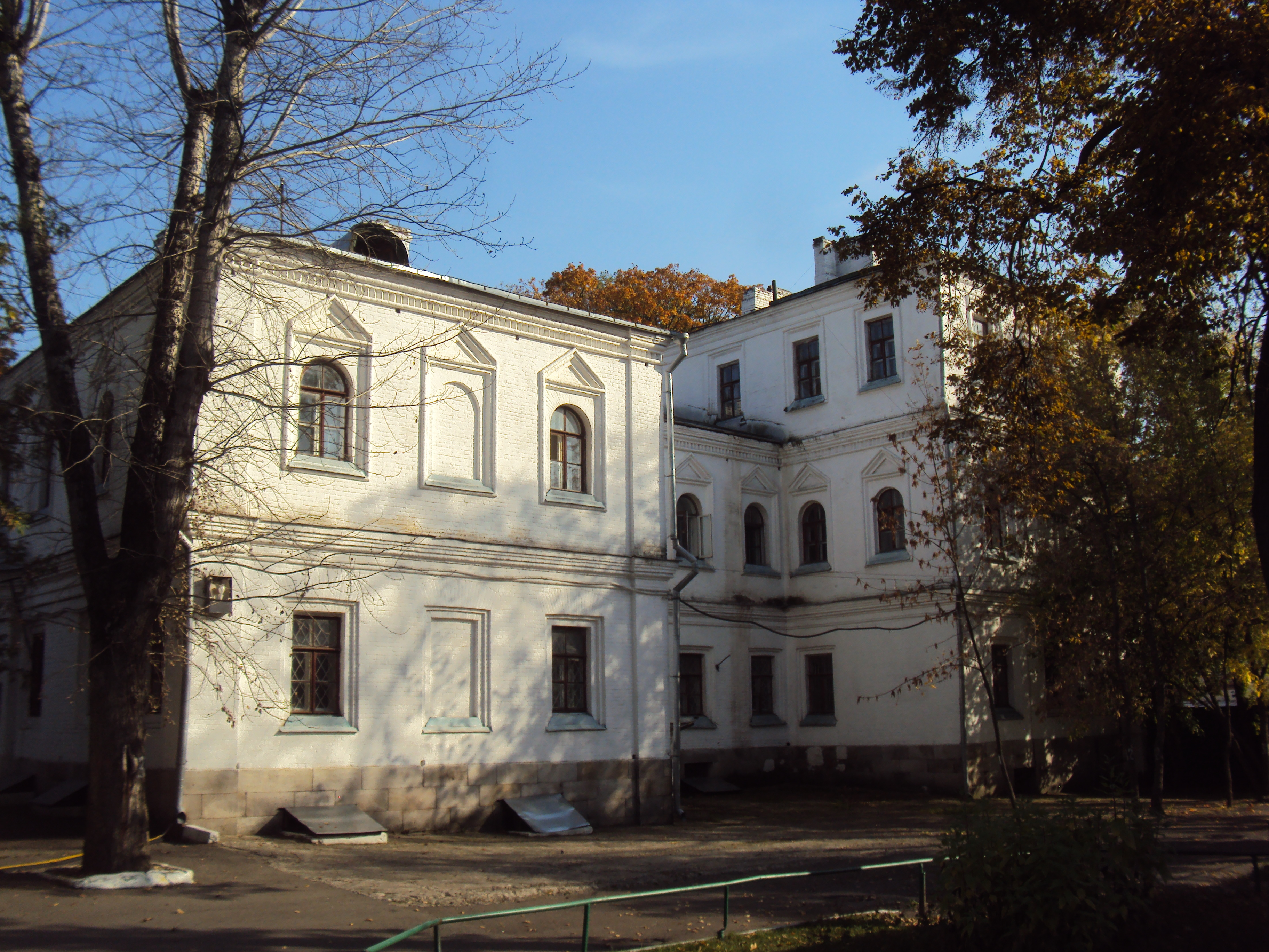 Служебный корпус у Передних ворот - южный жилой дом чиновников богадельни: городок им. Баумана, дом 2, строение 1, Измайлово, Восточный округ, Москва